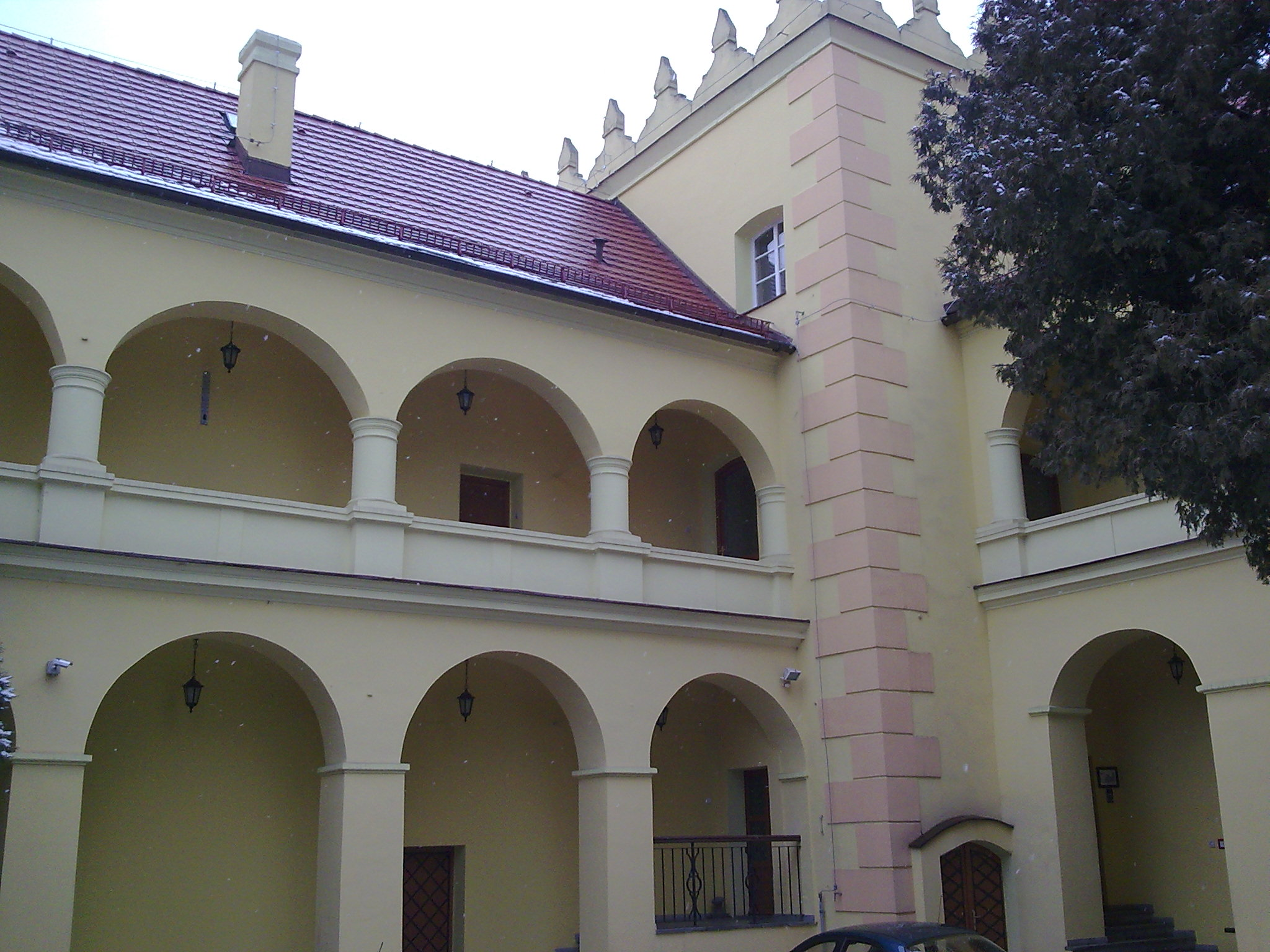 Arkady i attyka na zamku w Rogowie Opolskim.